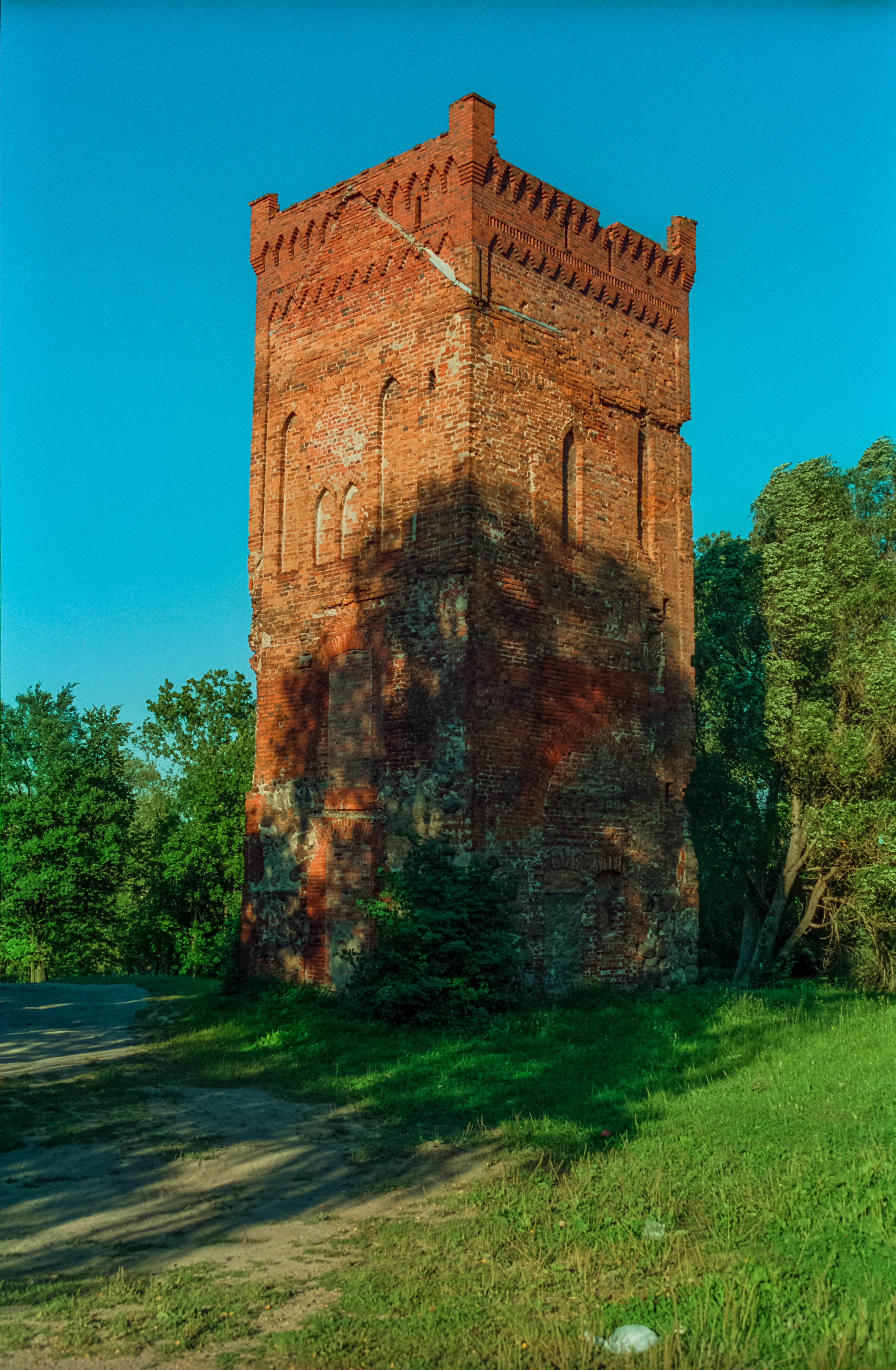 Braniewo, wieża zamkowa